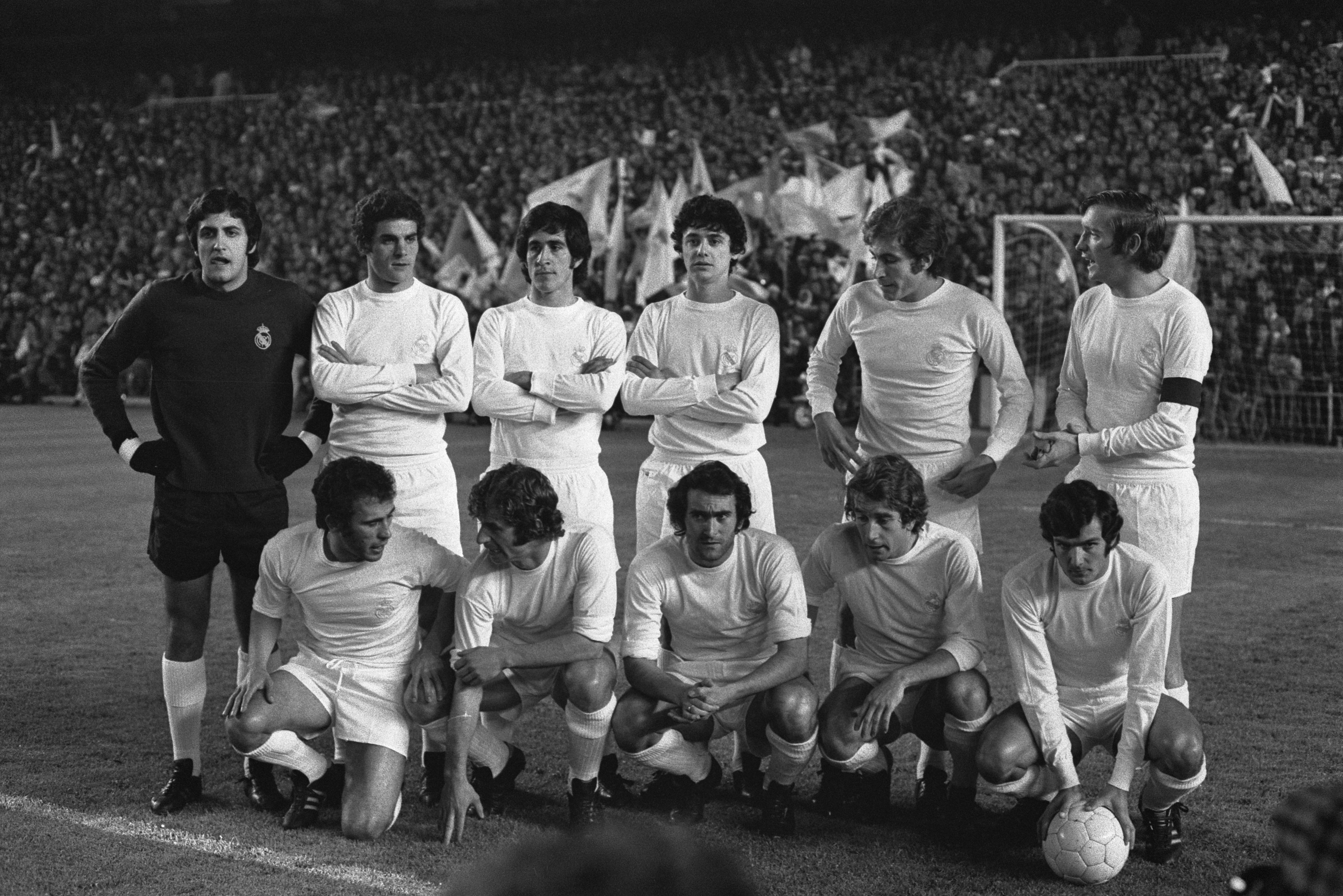 Collectie / Archief : Fotocollectie Anefo Reportage / Serie : [ onbekend ] Beschrijving : Halve finale Europacup I Ajax tegen Real 1-0, elftal Real Madrid Datum : 25 april 1973 Trefwoorden : elftallen, sport, voetbal Instellingsnaam : Real Madrid, Real Madrid Fotograaf : Mieremet, Rob / Anefo Auteursrechthebbende : Nationaal Archief Materiaalsoort : Negatief (zwart/wit) Nummer archiefinventaris : bekijk toegang 2.24.01.05 Bestanddeelnummer : 926-3706